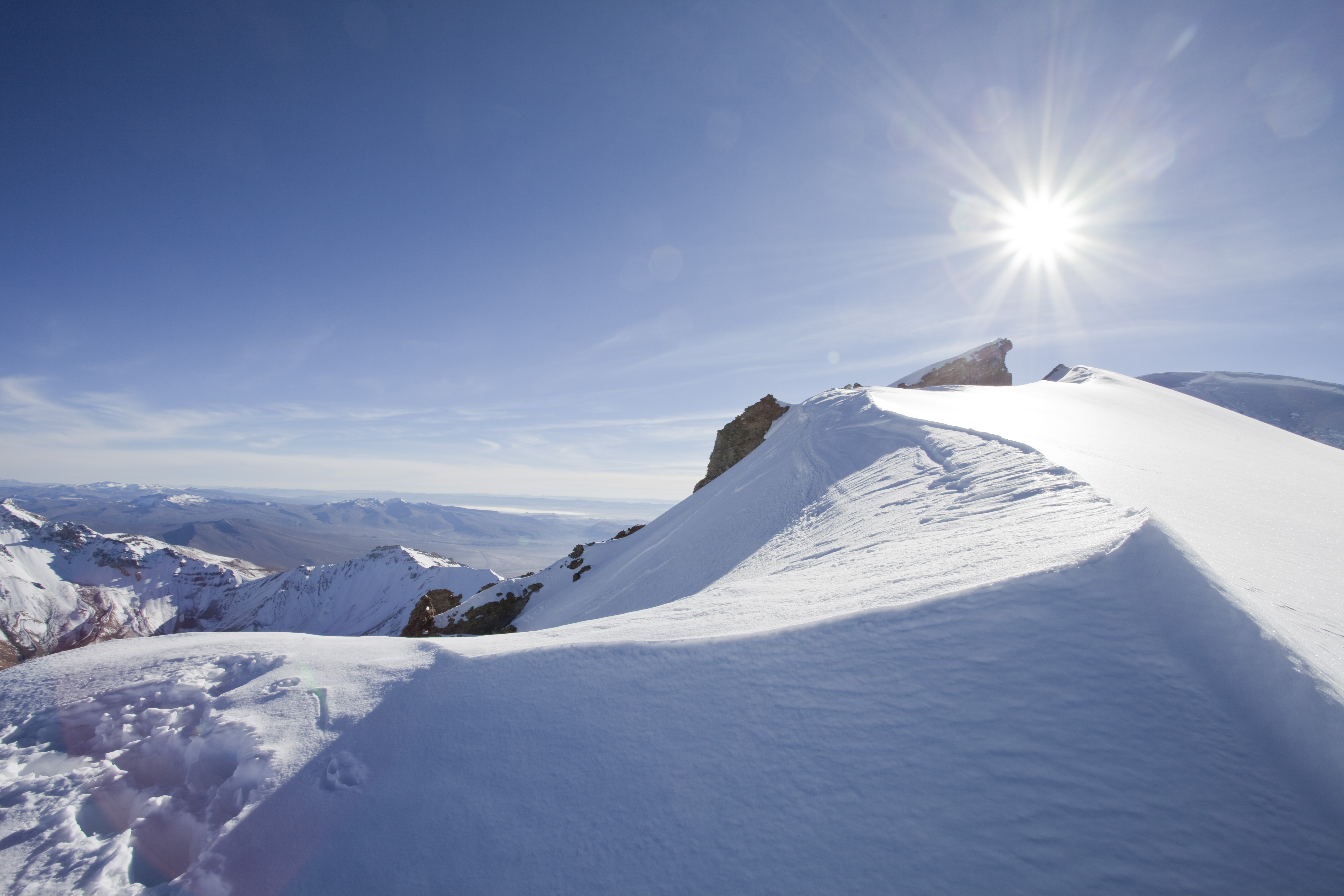 Chachani (6075m)